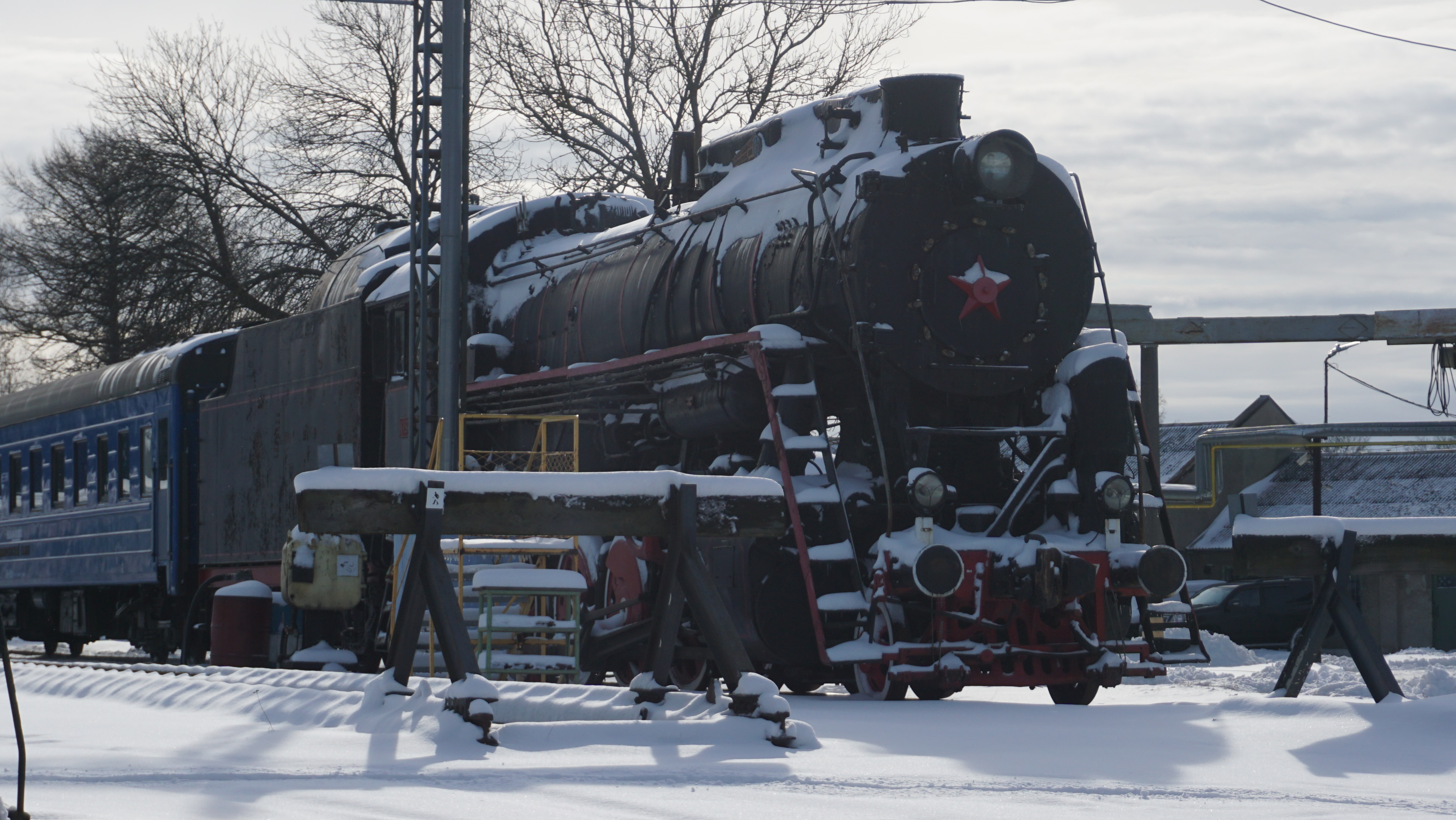 Eesti ja Baltimaade ainus töökorras auruvedur. Ehitatud Vorošilovgradi Veduritehases 1953. aastal. Tegemist on L-tüüpi veduriga, nimeks Kaspar (L-3297). Vedur renoveeriti 2010. aastal. Fotol seisab vedur Tallinn-Väike depoo territooriumil.